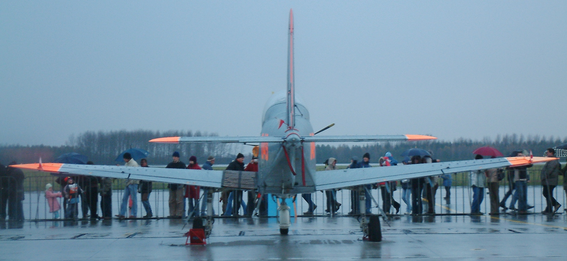 PZL-130TC-1 Orlik #049 of Polish Air Force, 31st. Air Base Poznań-Krzesiny